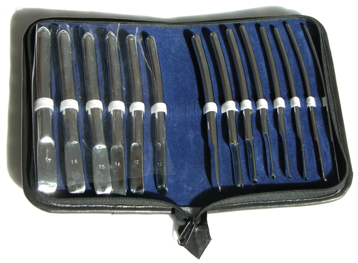 Dilatator-Set Hegar in den Größen 4 bis 17 mm (von rechts). Set verschiedener Hegarstifte.